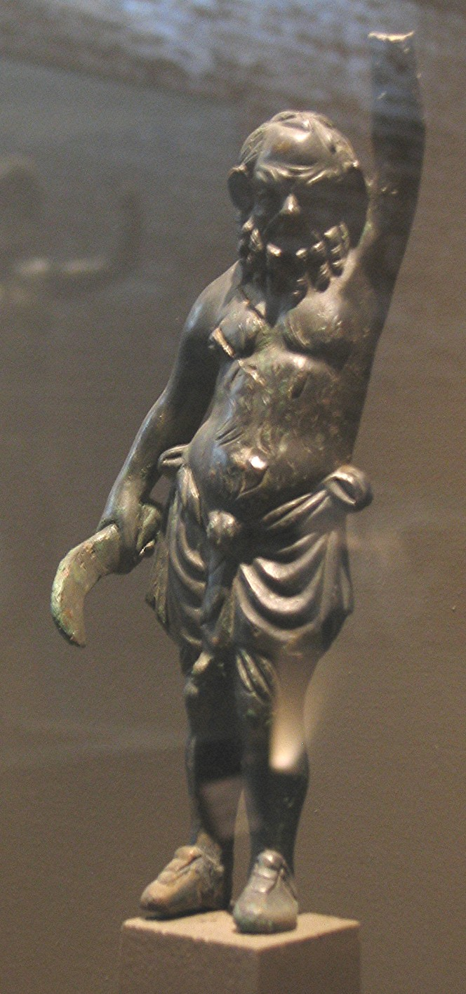 Sylène en bronze retrouvé au Vieil-Évreux, conservé au musée d'Évreux